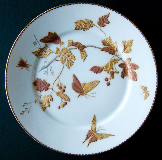 Piatto di prova del servizio per Umberto I Savoia del 1881. Ginori a Doccia, 1881